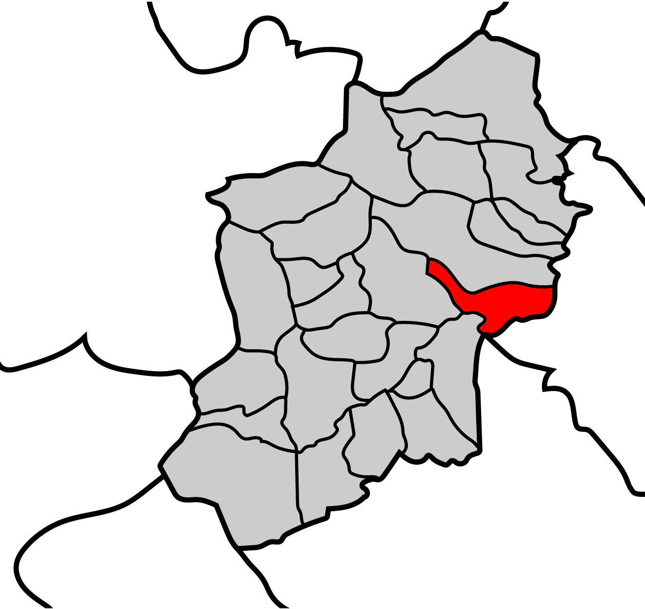 Mapa de la parroquia de Liber ayuntamiento de Becerreá